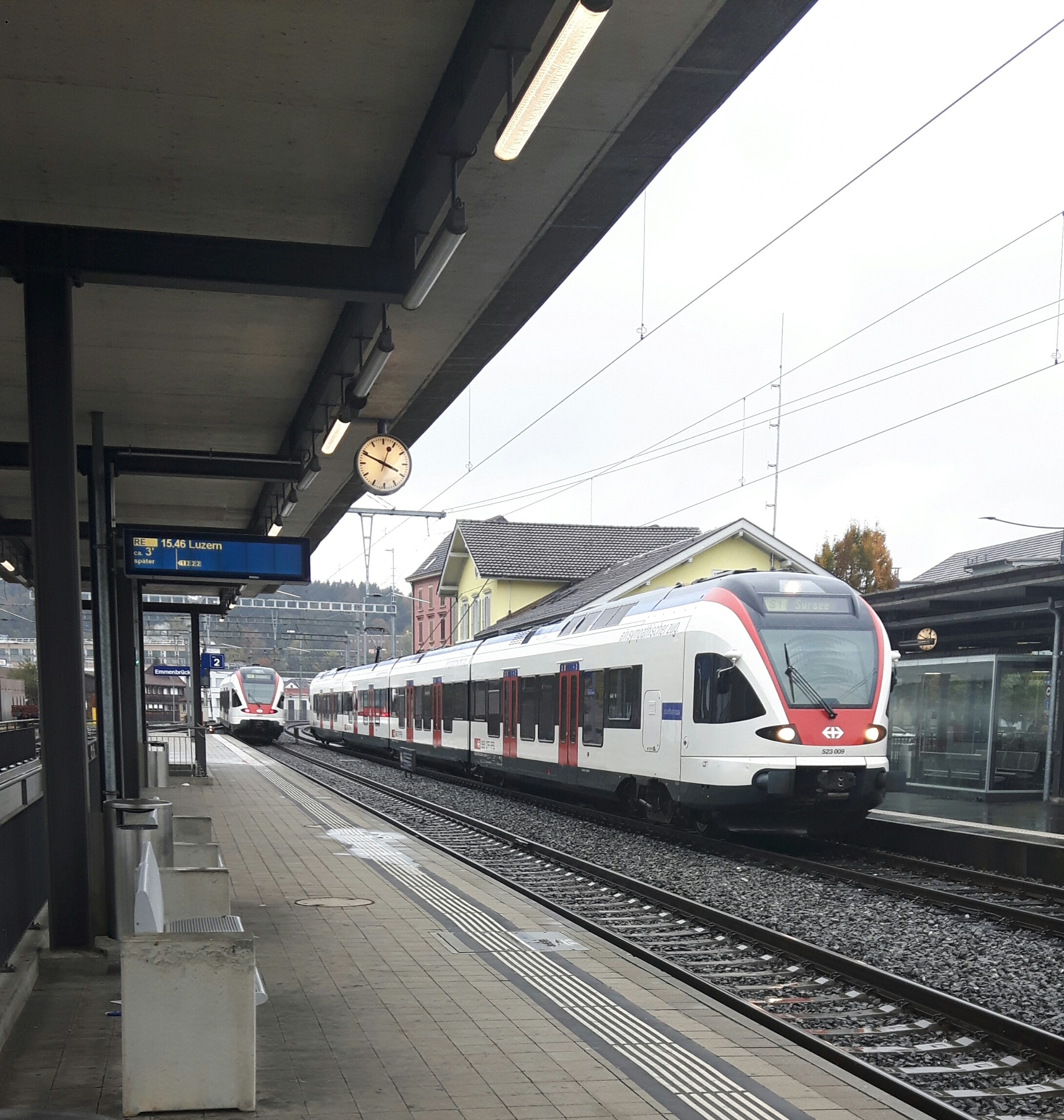 Bahnhof Emmenbrücke in Emmen, Kanton Luzern (2018)